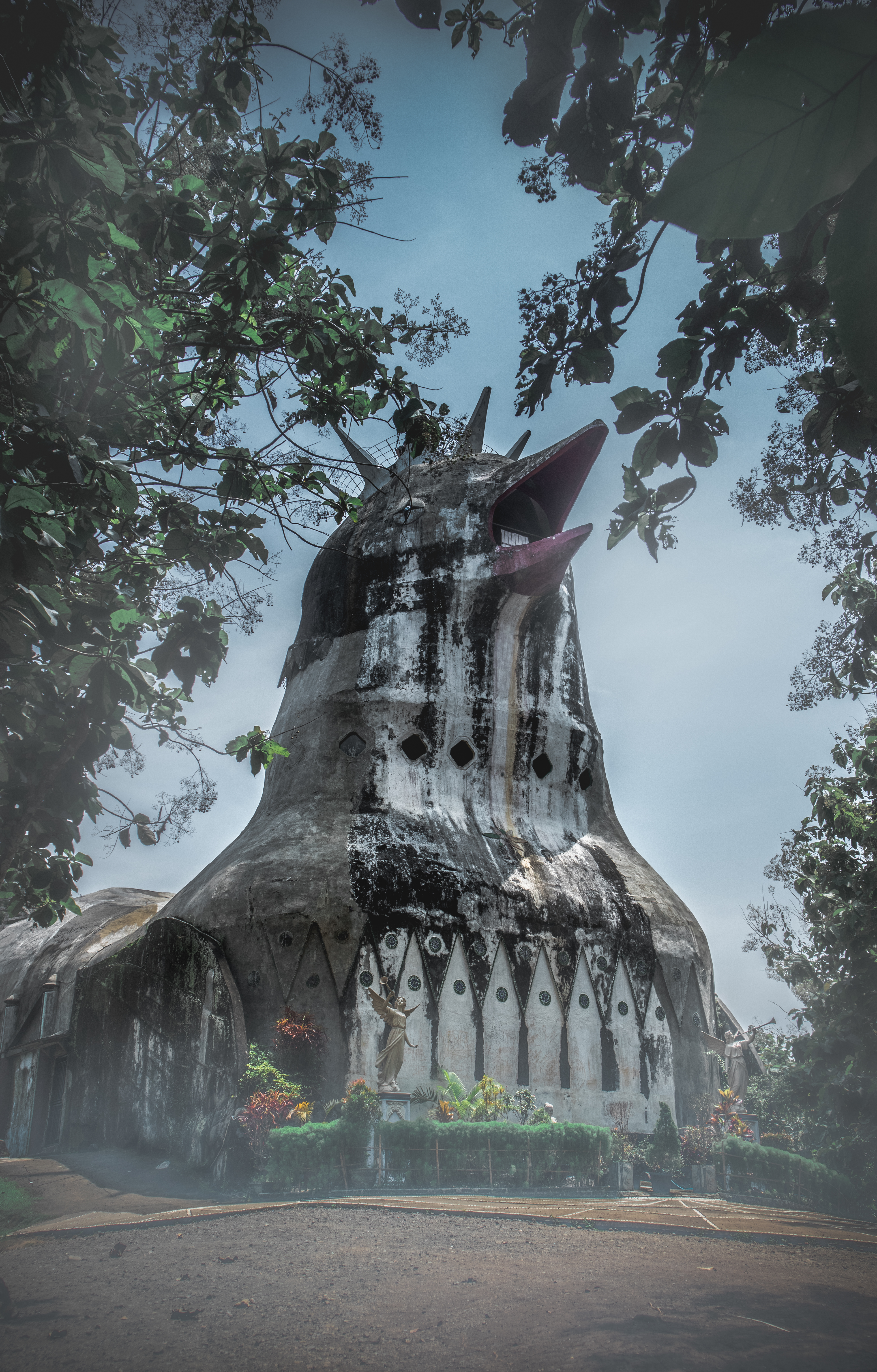 Gereja ayam yang biasa di gunakan untuk beribadah warga setempat, tapi biasa di jadikan tempat wisata juga